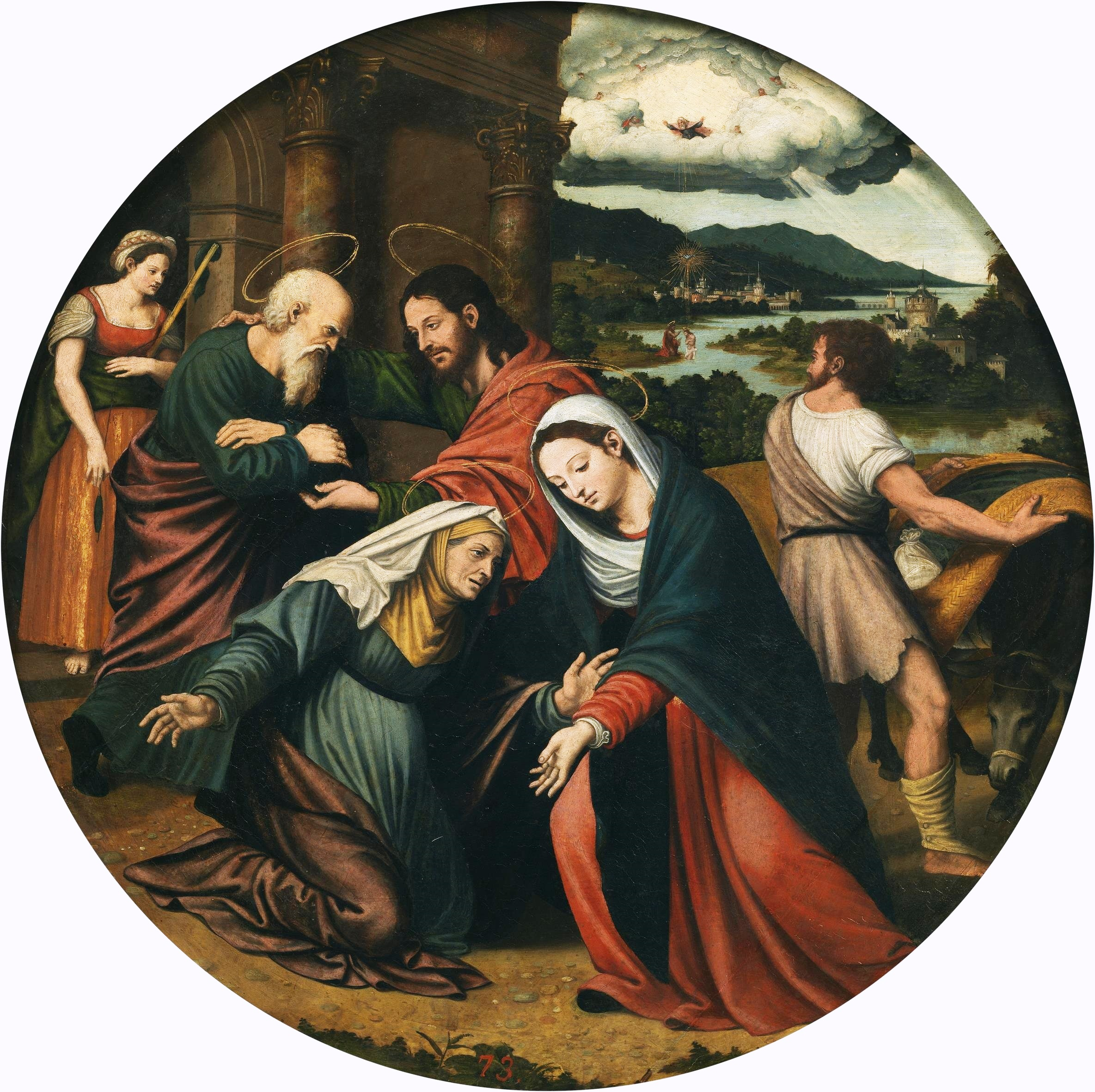 La obra representa el momento en que la Virgen María visitó a su prima Santa Isabel, que estaba embarazada y daría a luz al profeta San Juan Bautista.